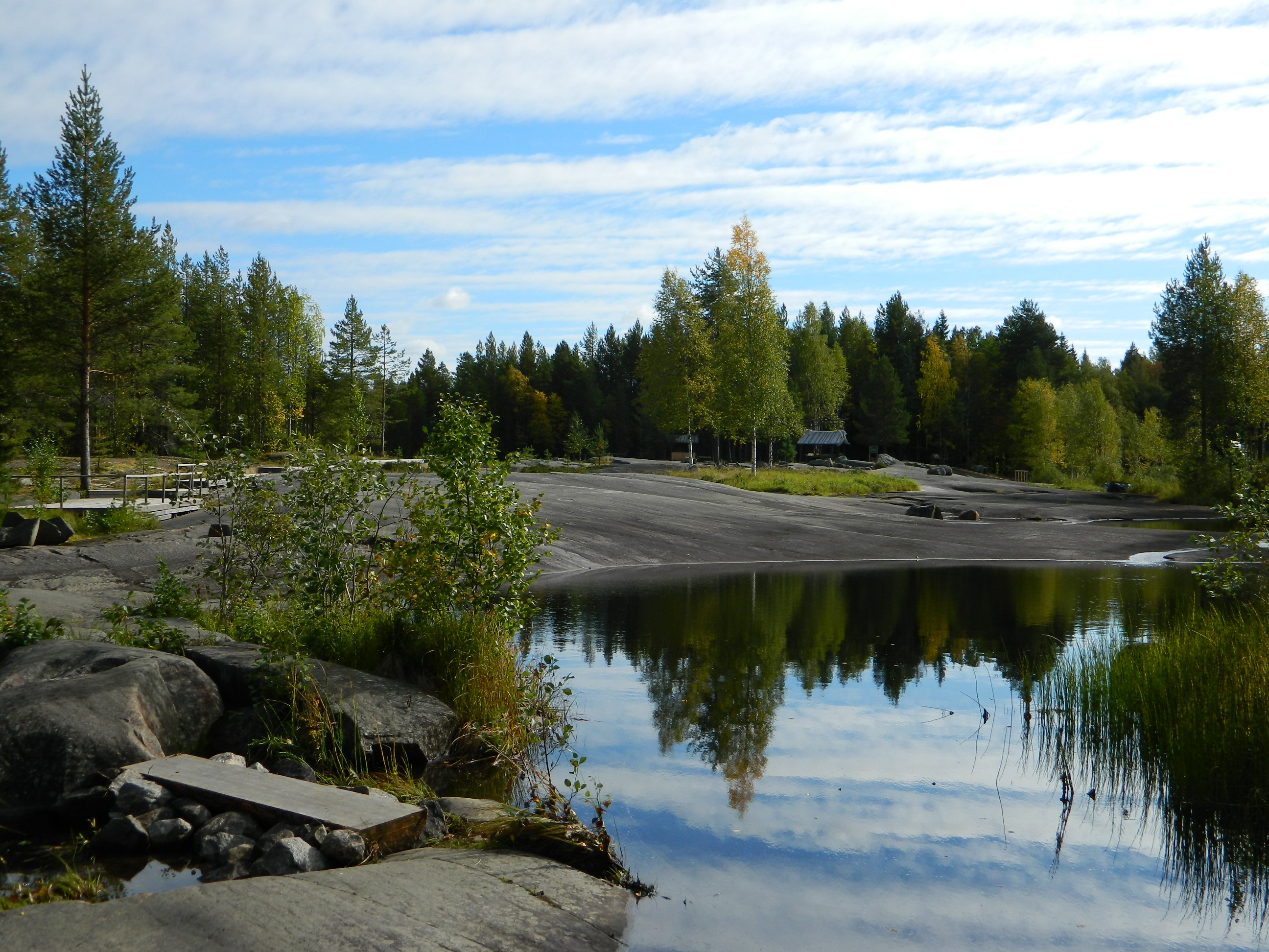 Обзорный вид на поляну с петроглифами